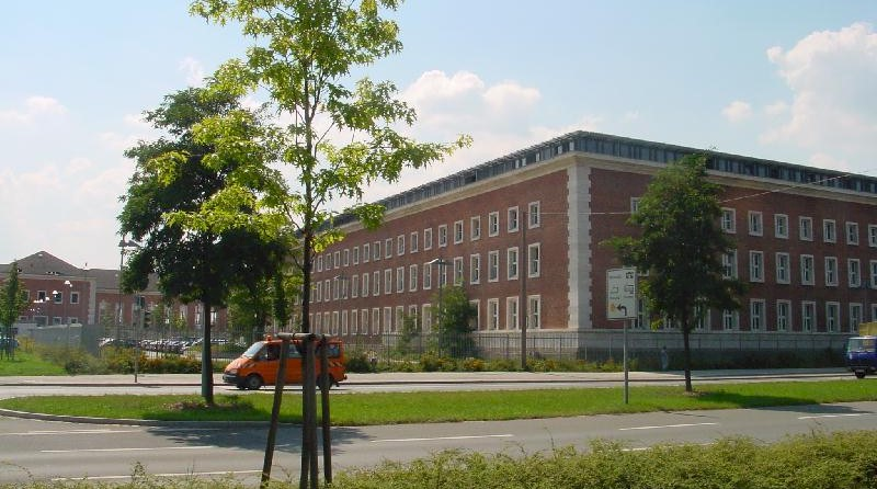 Ludwig Ruff - Südkaserne Nürnberg - (ehem. SS-Unterkunft)